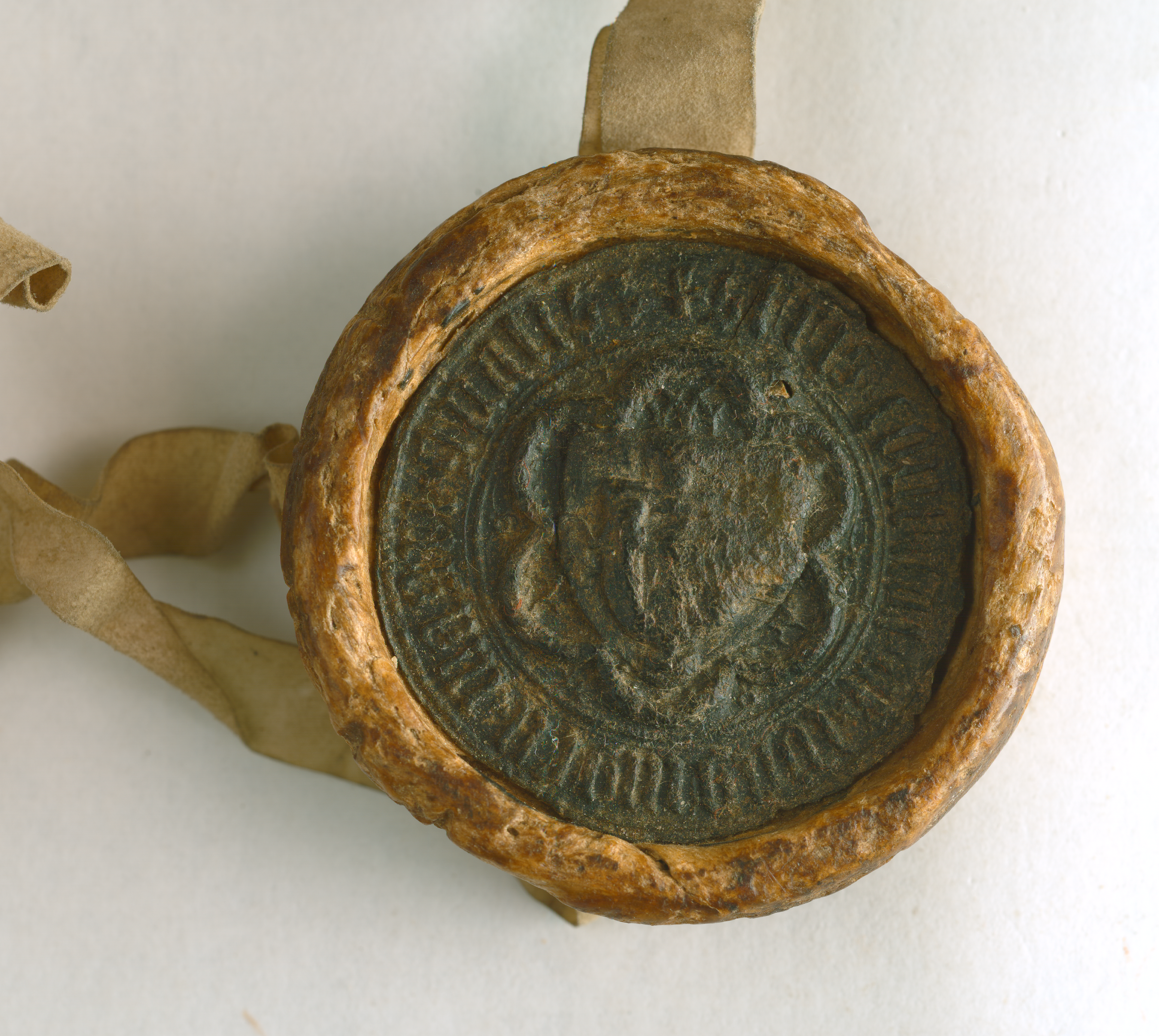 Pieczęć Konrada von Jungingen, wielkiego mistrza zakonu krzyżackiego; odcisk w czarnym wosku, na pasku; średnica: 3,8 cm; tarcza z godłem zakonu krzyżackiego ujęta w 6 połączonych łuków. Pieczęć w bardzo dobrym stanie; legenda: + S FRIS CONRADI DE IUNGINGEN MAGRI GNALIS.